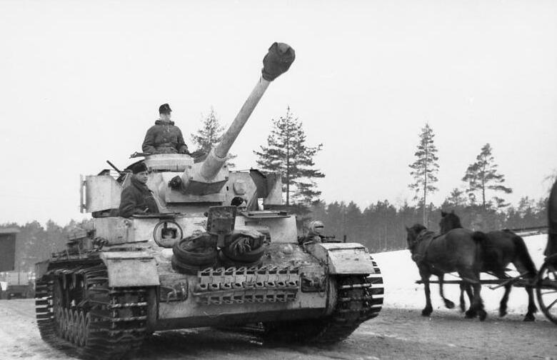 Scherl: Auf einer Verbindungsstraße zwischen Ilmensee und Finnischem Meerbusen Im Zuge der Frontverkürzung gehen Einheiten in planmäßiger Ordnung in die ihnen neu zugewiesenen Stellungen. Achtung! PK-Aufnahme Kriegsberichter Reimers 28.2.44 [Herausgabedatum] Zentralbild: II. Weltkrieg 1939-45 An der Front in der Sowjetunion. Ende Februar 1944. Bei der sowjetischen Offensive zur Befreiung des Leningrader Gebietes Januar-März 1944 räumen die deutschen Truppen das ganze Gebiet zwischen Ilmensee und Finnischem Meerbusen bis zum Peipus-See.